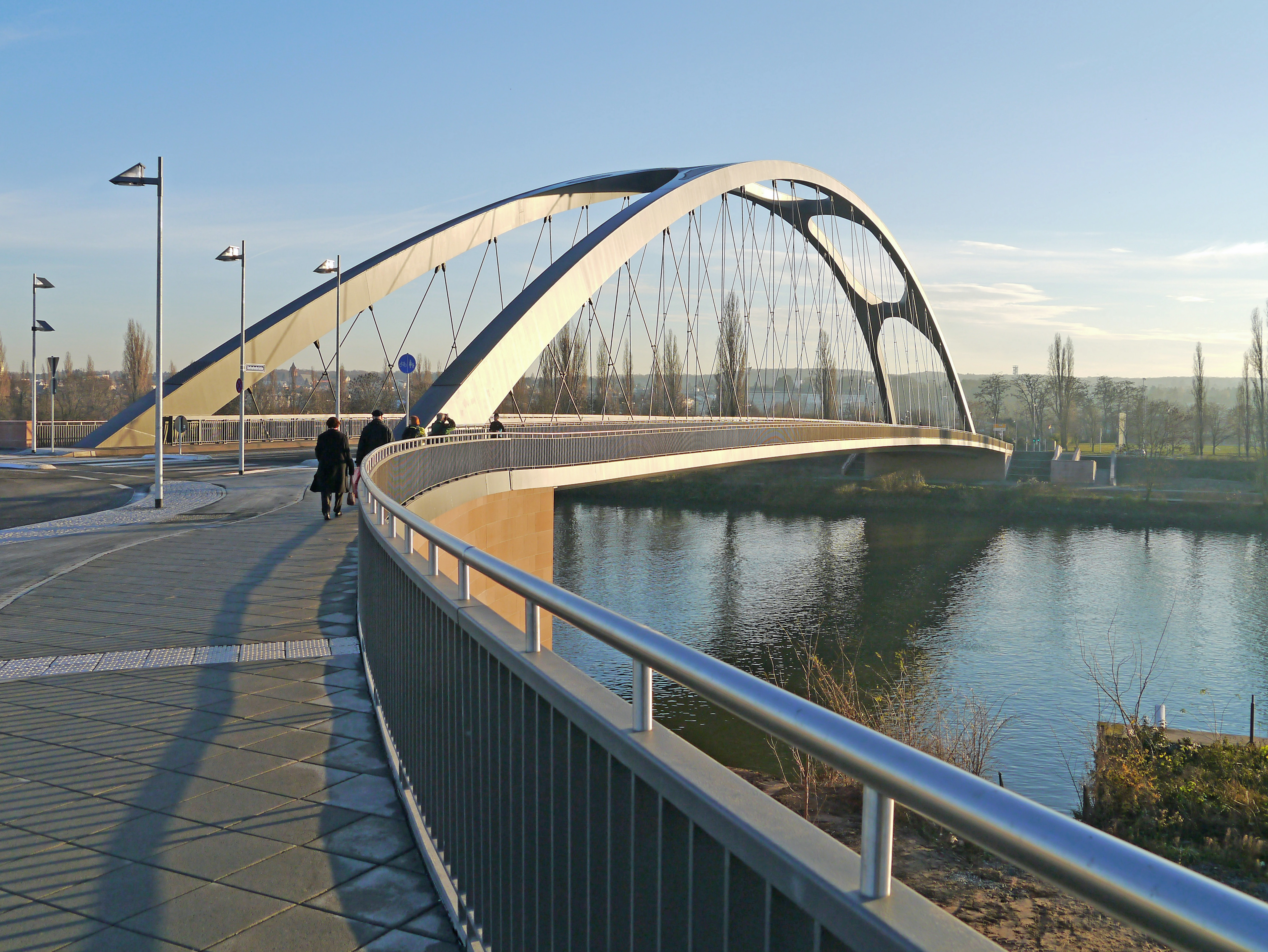 Die Osthafenbrücke (2013), gesehen von der Honsellbrücke in Frankfurt-Ostend.